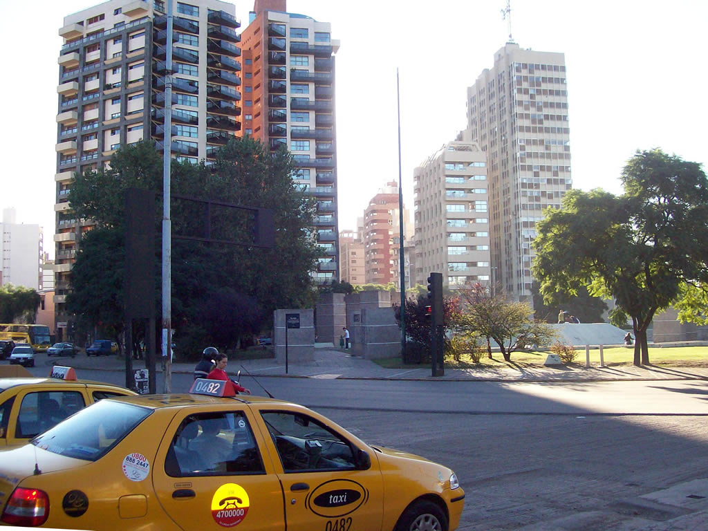 Taxis en la Plaza España, Córdoba, Argentina. Las Torres de la Plaza (1992) se aprecian a la derecha.